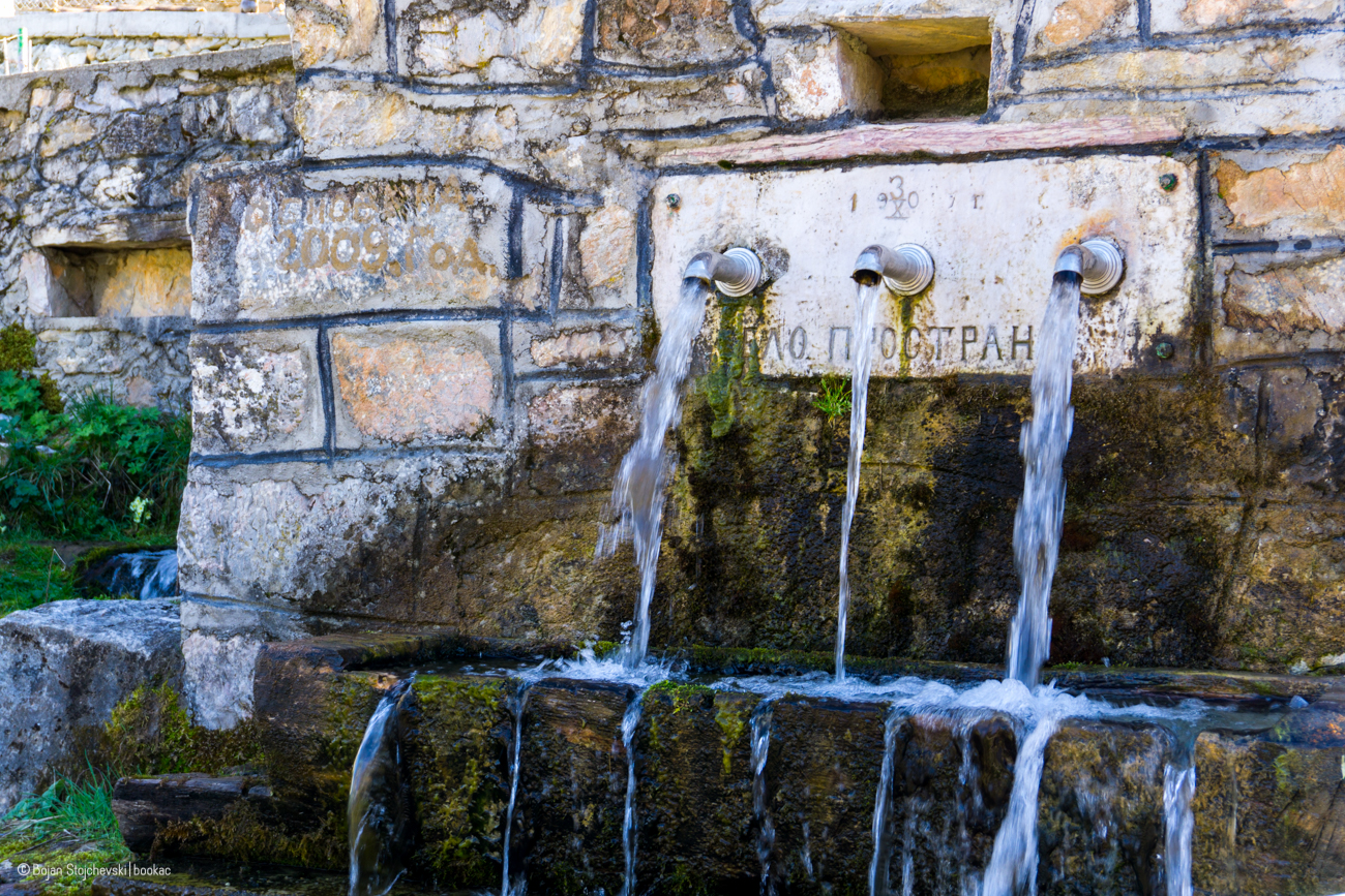 Трите чешми во село Прострање низ кој тече изворска планинска вода, од која се полни природниот базен кој се користи за Водици.